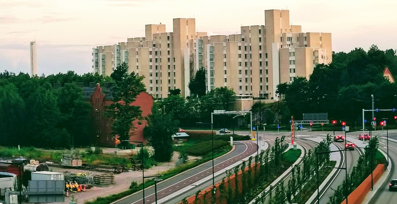 Auroranlinna (Pasila)